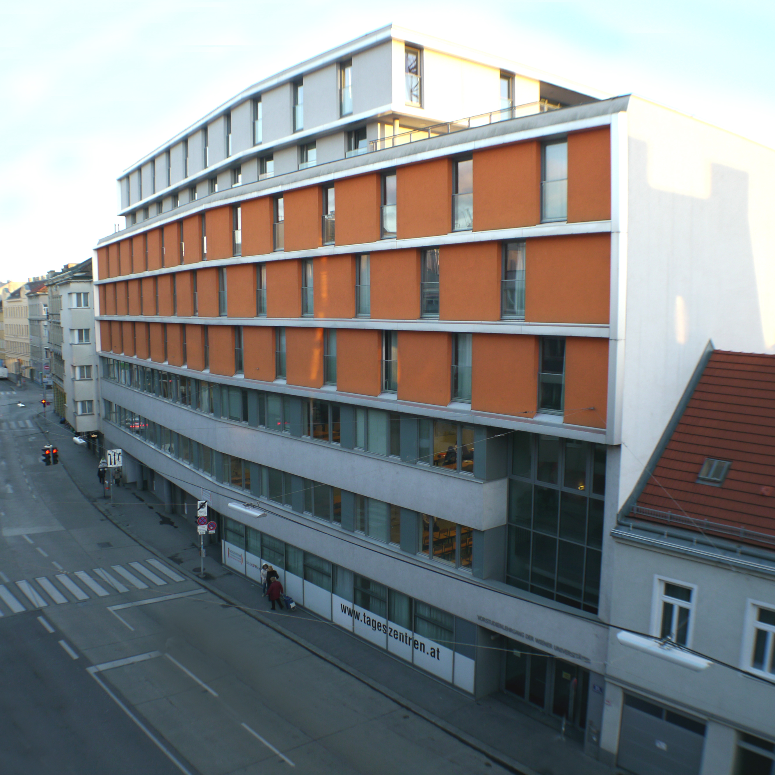 Sitz des Vorstudienlehrganges der Wiener Universitäten seit 2009 - Foto: H.V.